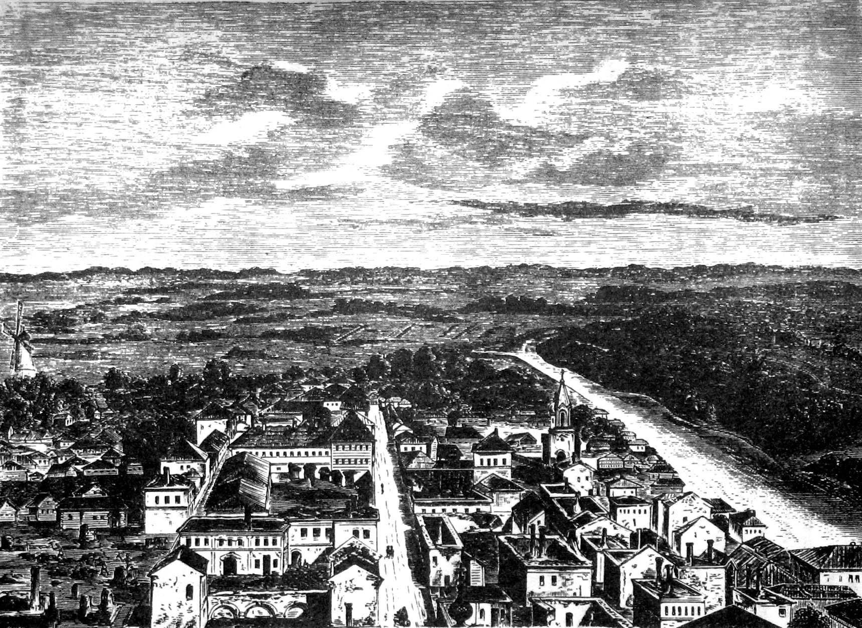 Polatsk